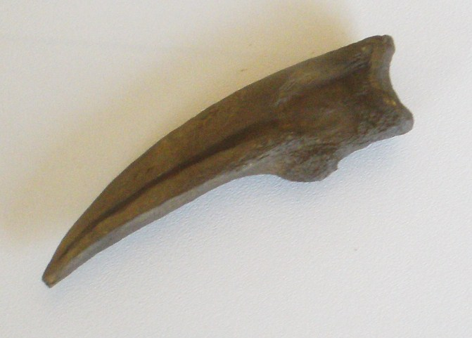 Fossil of Ornithomimus, an extinct theropod- Took the photo at De Groene Poort, Boxtel